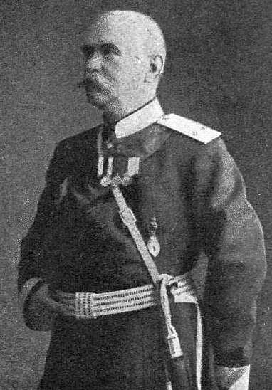 Андрей Николаевич Селиванов (5 августа 1847 — 15 июля 1917) — русский Генерал от инфантерии.